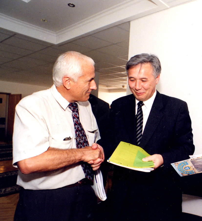 На виставці книг у Києві.Білецький Володимир Стефанович (ліворуч) та прем'єр-міністр України Єхануров Юрій Іванович (в Києві).